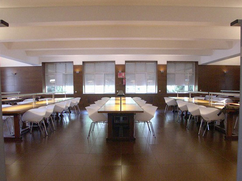 Biblioteca de la Escuela Técnica Superior de Arquitectura de Madrid (España).